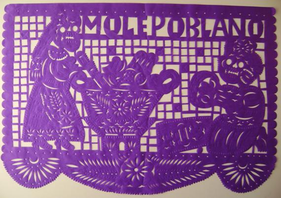 ejemplo de papel picado